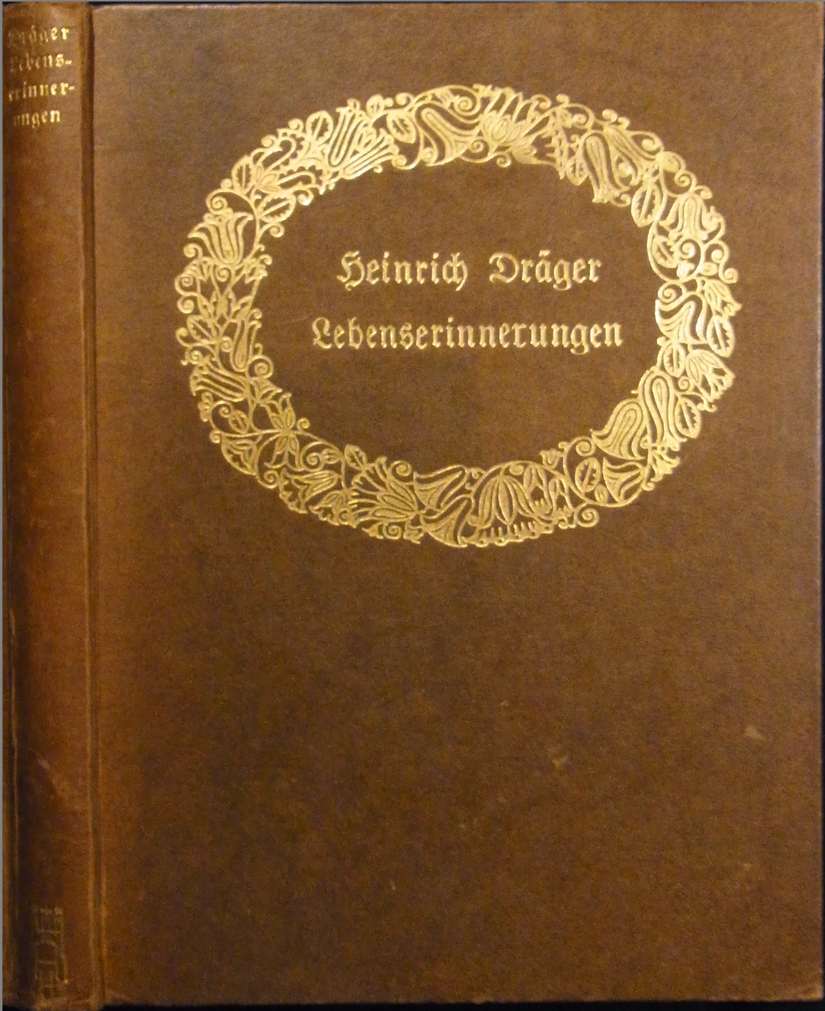 goldener Glockenblumenkranz als Buchtitel-Vignette für die "Hamburgische Hausbibliothek" des Verlages Alfred Janssen, Hamburg - gestaltet von Carl Otto Czeschka (1878-1960)